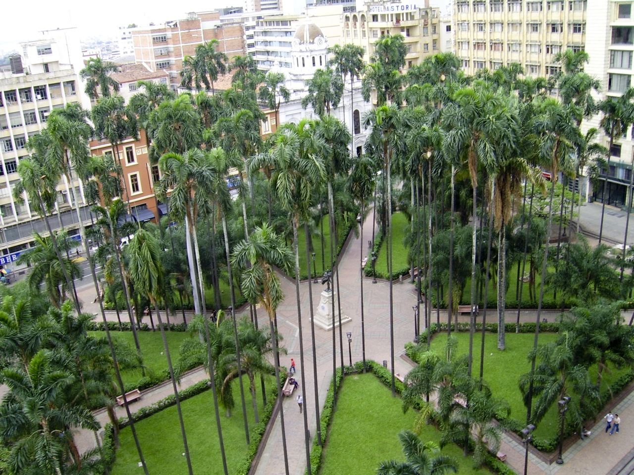 Plaza de Caicedo, Cali, Colombia